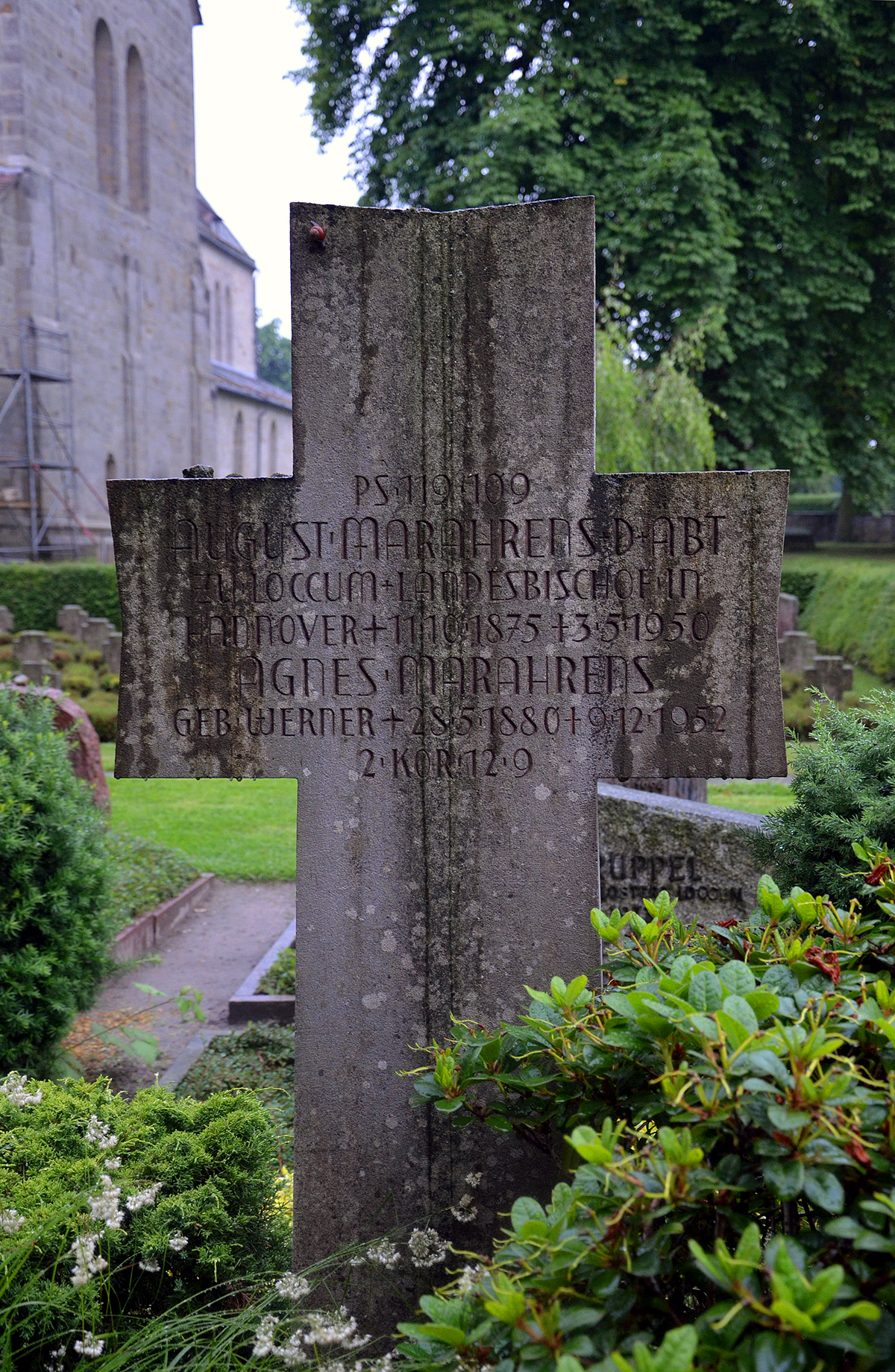 Das Grabkreuz von August Marahrens (11. Oktober 1875 - 3. Mai 1950), Abt vom Kloster Loccun und Landesbischof in Hannover, sowie von Agnes Marahrens, geborene Werner (28. Mai 1880 - 9. Dezember 1952) auf dem Klosterfriedhof von Rehburg-Loccum ...